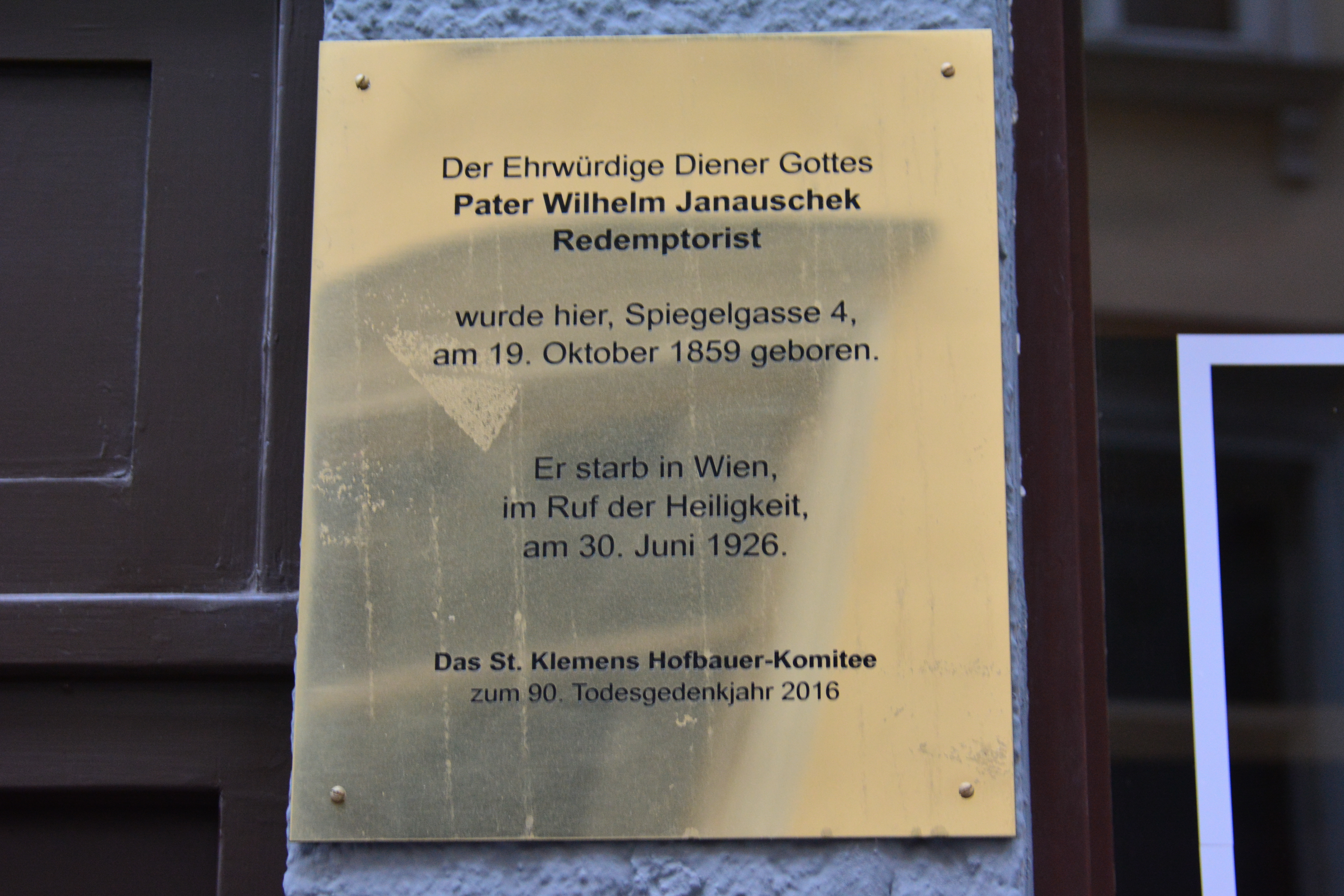 Gedenktafel für Wilhelm Janauschek (Wien, Spiegelgasse 4)